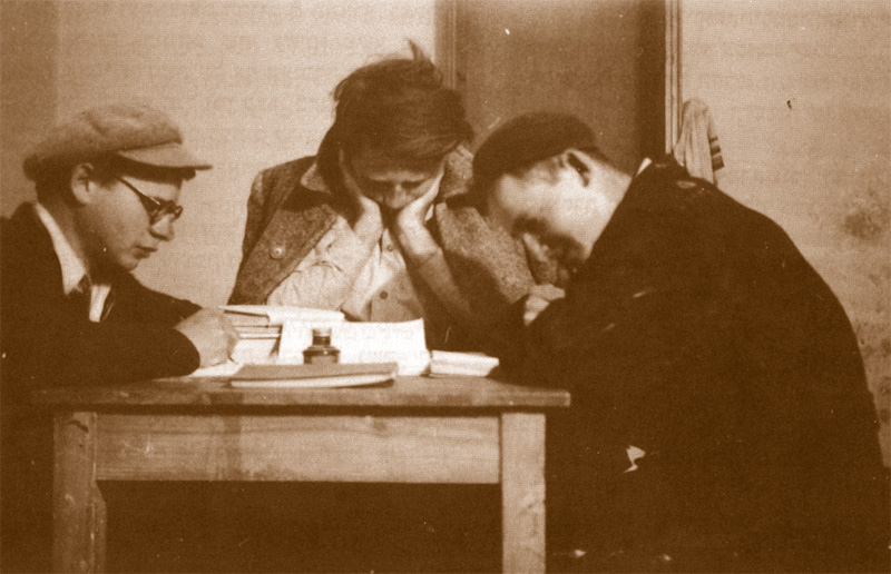 ביריה אסירים 1946 ארכיון ההגנה